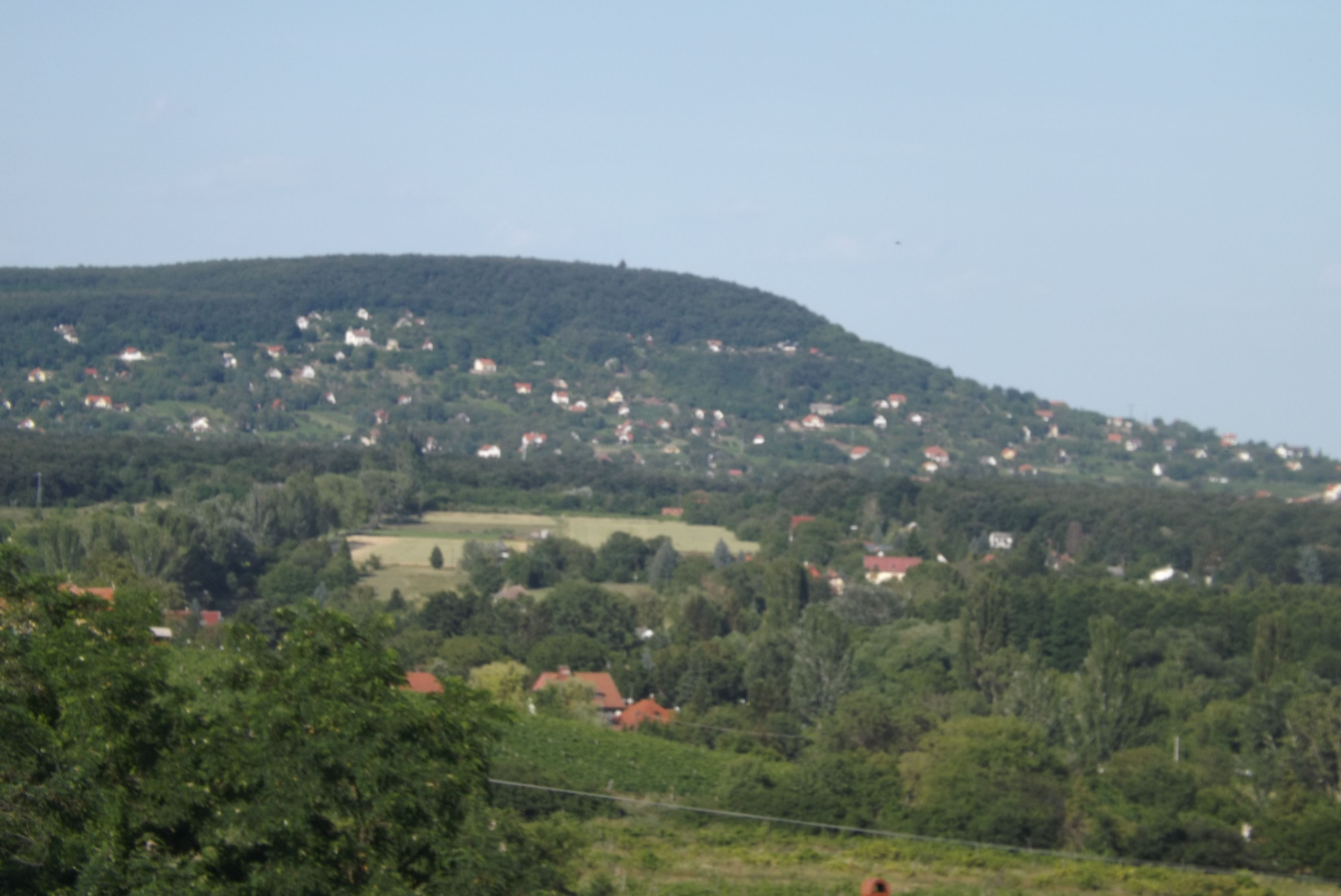 Ábrahámhegyi látkép